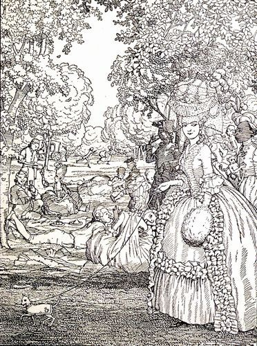 Иллюстрация к "Книге маркизы". галантная сцена.